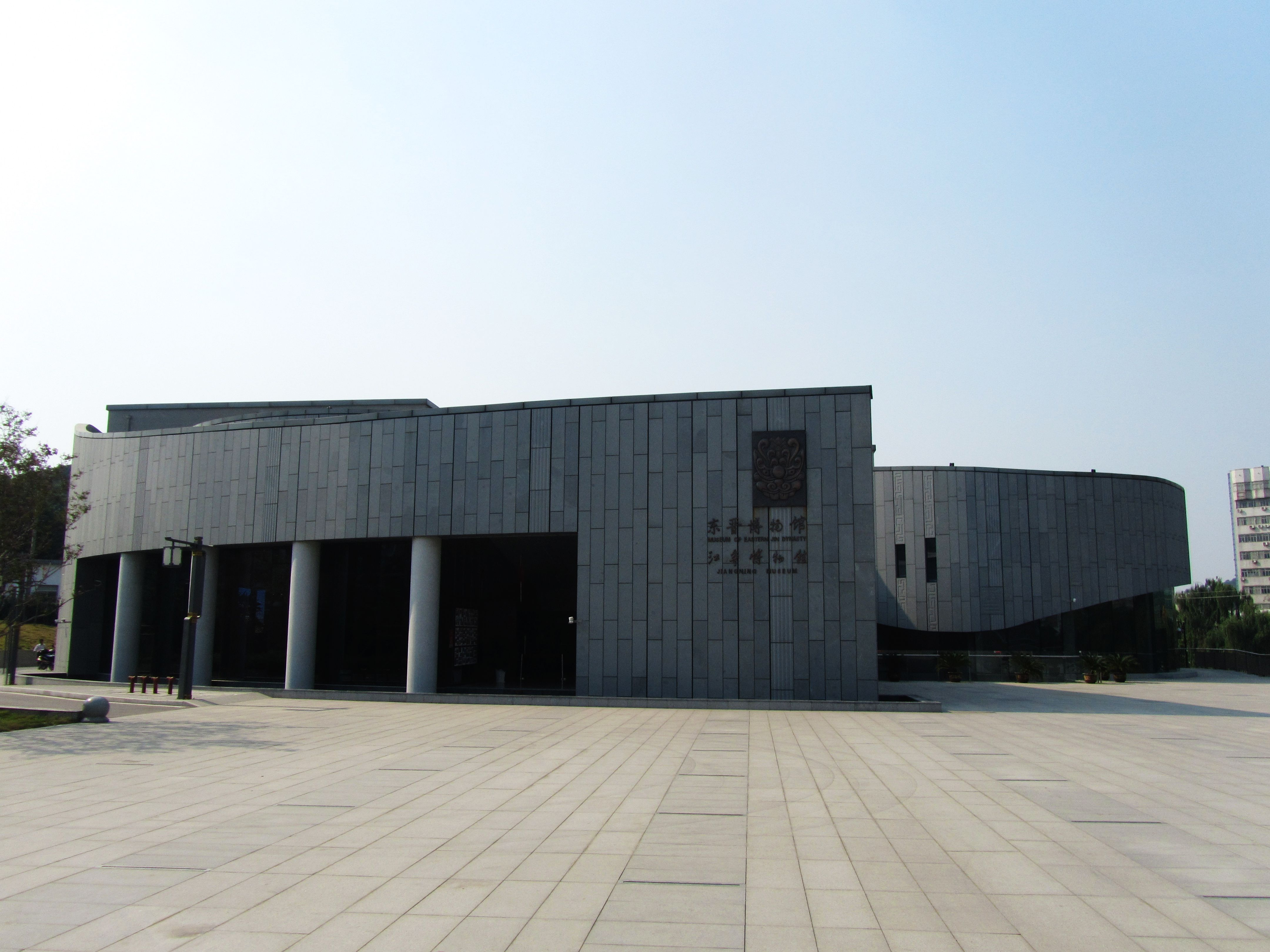 南京江宁博物馆暨东晋历史文化博物馆。